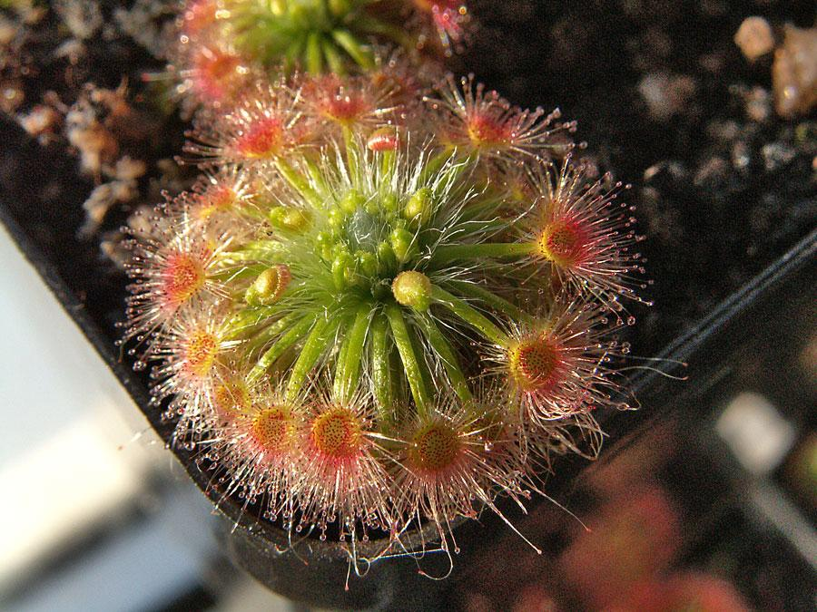 Drosera oreopodion in cultivation